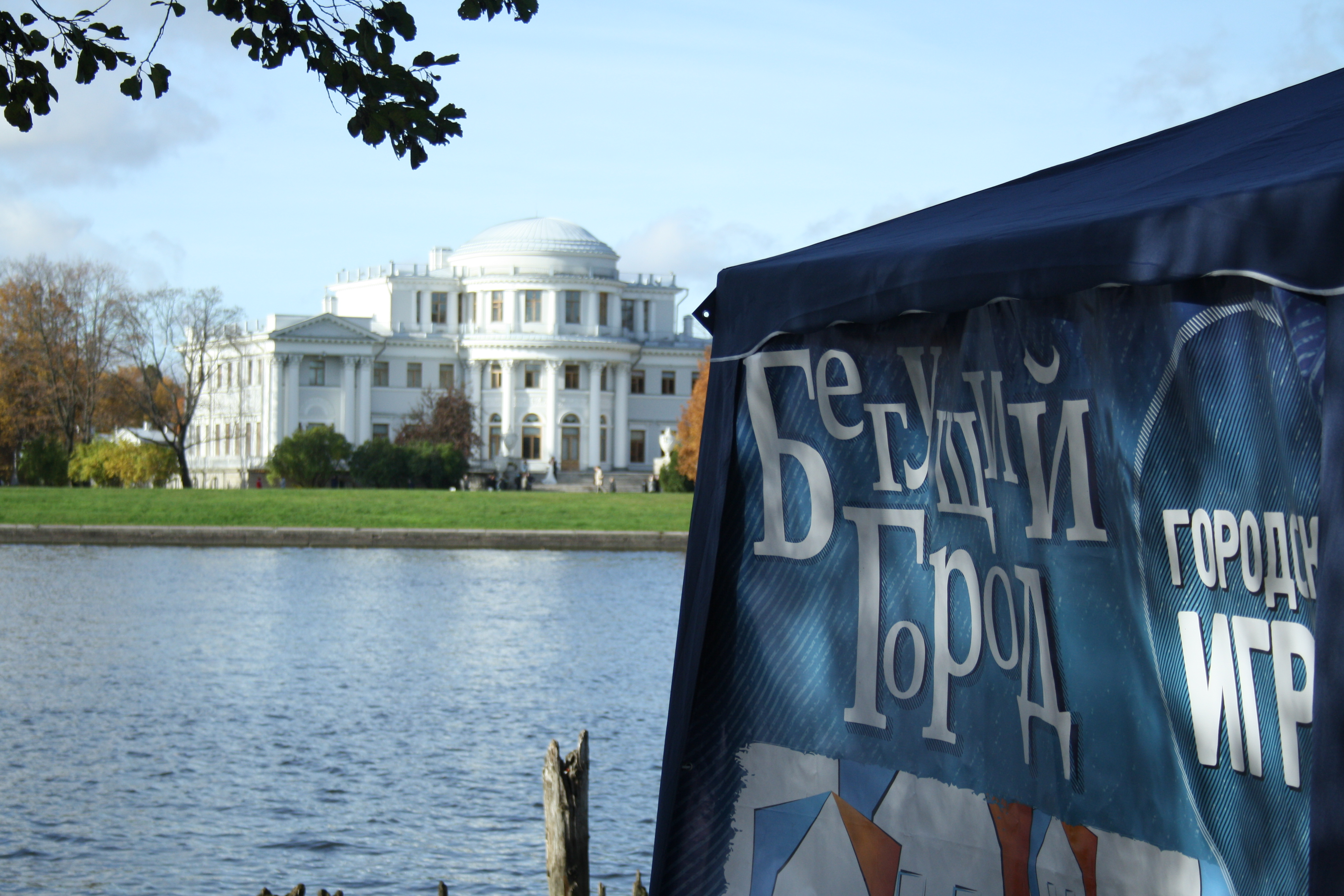 Елагин дворец (Санкт-Петербург и Лен.область, Санкт-Петербург, Елагин остров, 4)